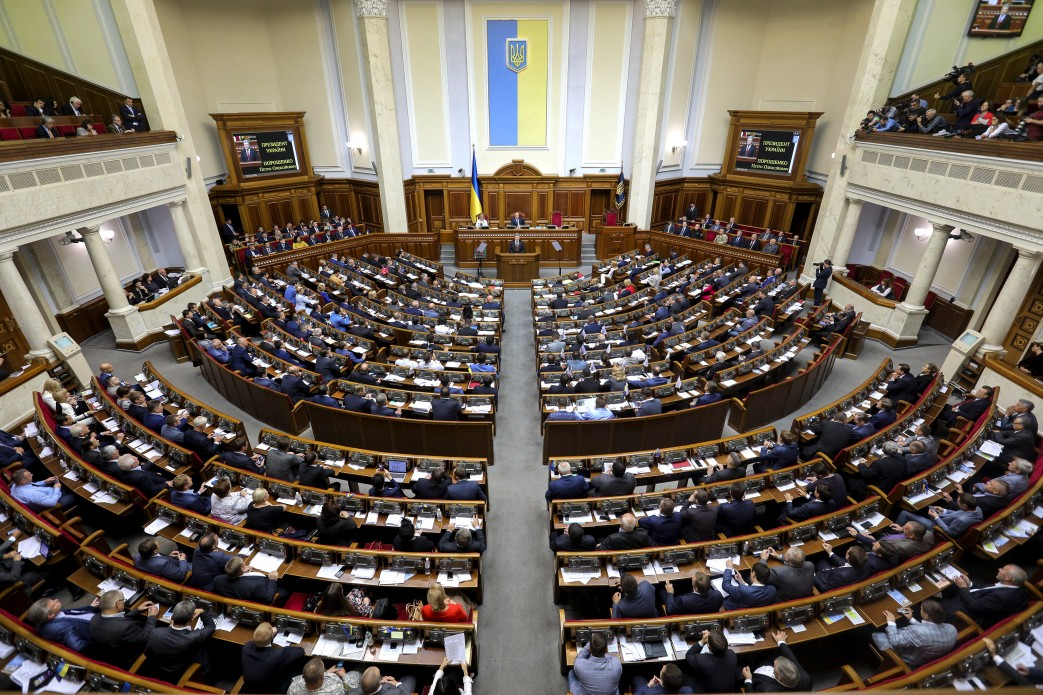 Президент України Петро Порошенко виступає зі Щорічним Посланням до Верховної Ради України «Про внутрішнє та зовнішнє становище України в 2017 році». 7 вересня 2017 року.